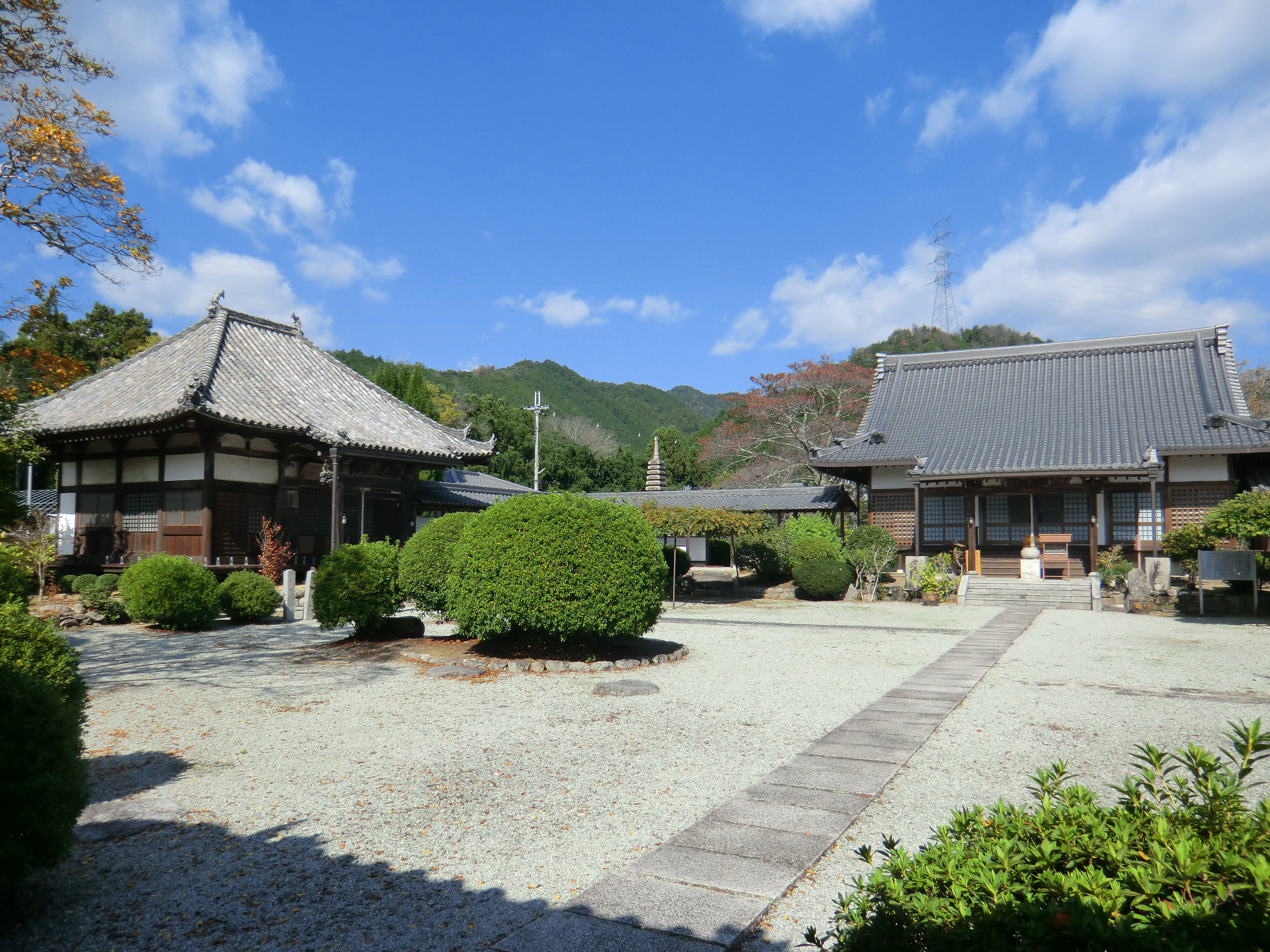 霊鷲山世尊寺（史跡比曽寺跡） (2014年10月撮影)